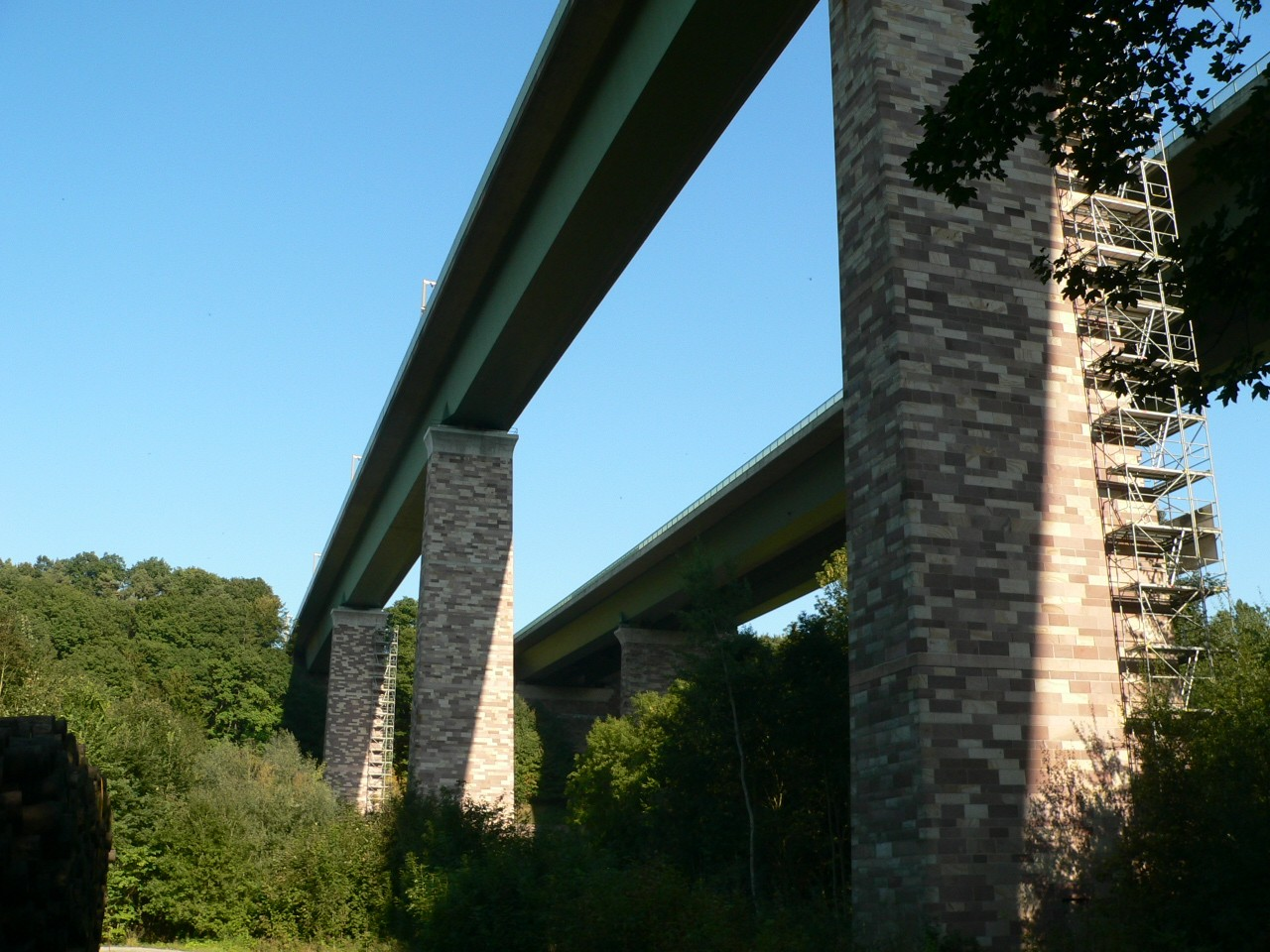 Werratalbrücke der ICE-Strecke Wuerzburg - Hannover. Rechts daneben Werratalbrücke der A 7.